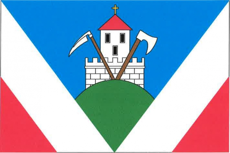 vlajka, Věžnice, okres Jihlava